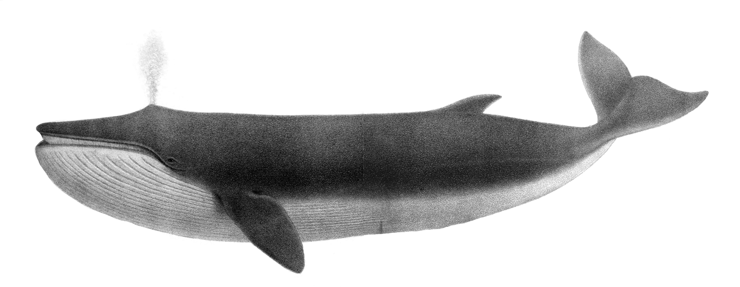 Balaenoptera physalus